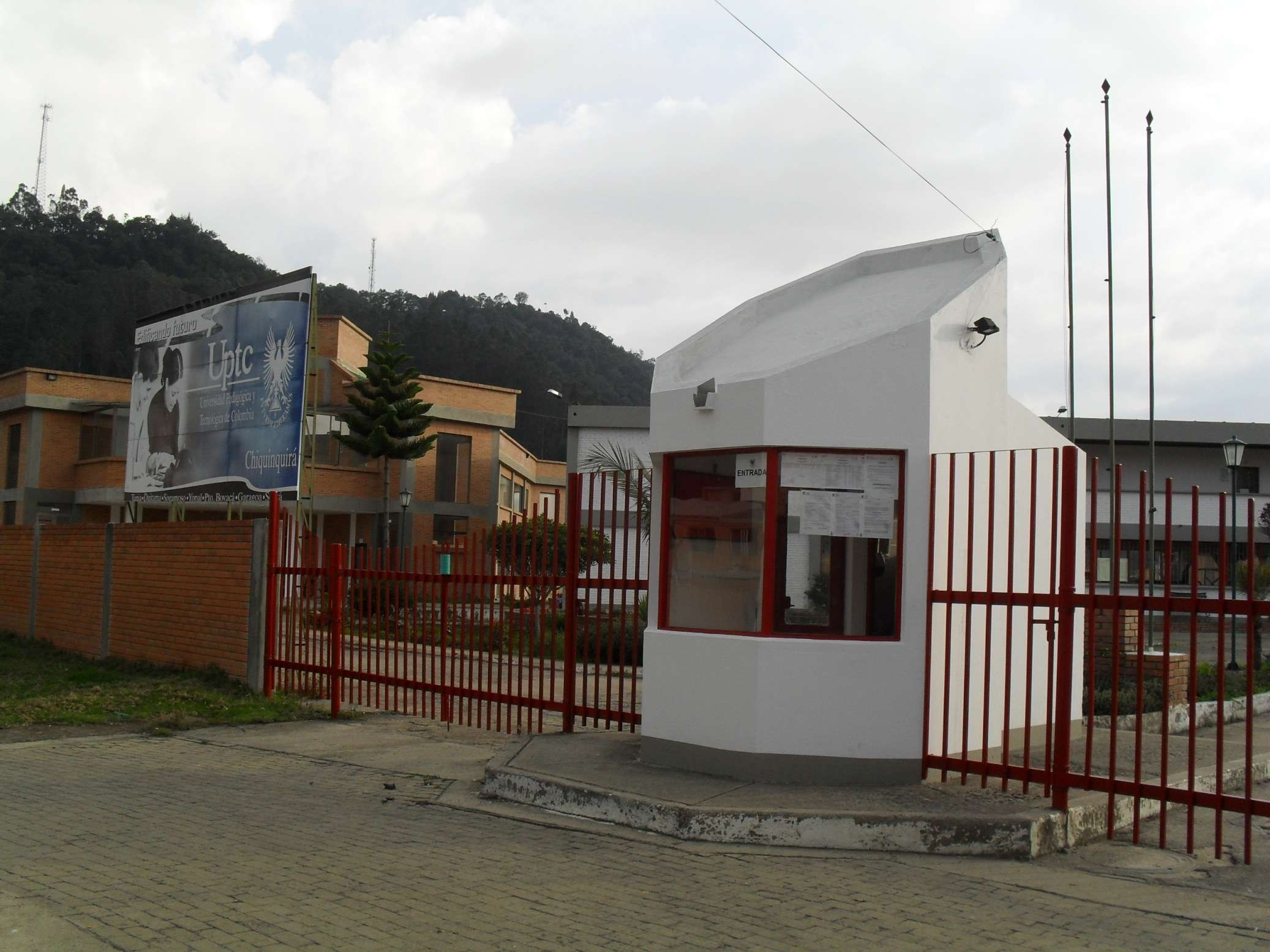 Foto de la entrada a la sede de la Universidad Pedagógica y Tecnológica de Colombia en la ciudad de Chiquinquirá Boyacá Colombia